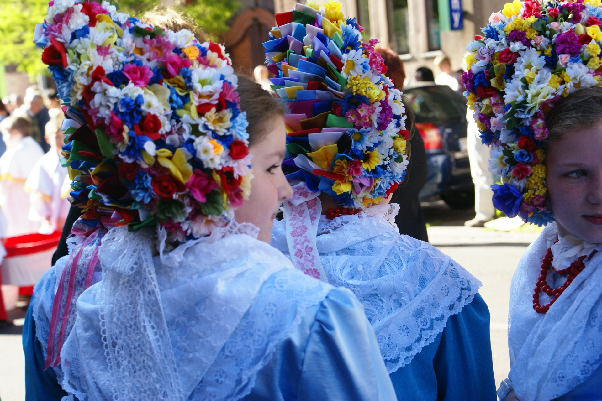 Procesja Bożego Ciała